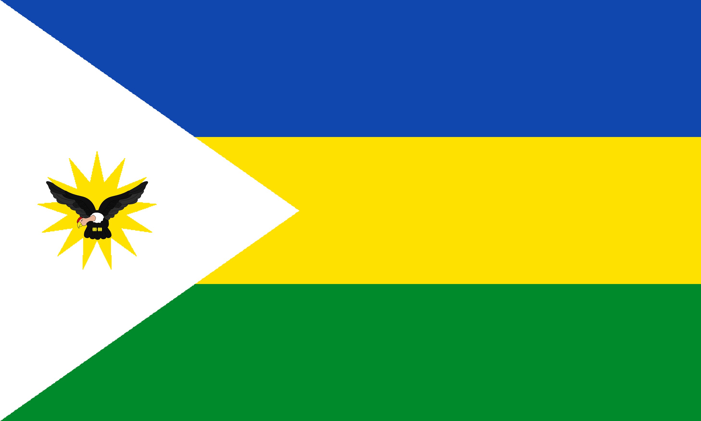 Candarave, Tacna, Perú